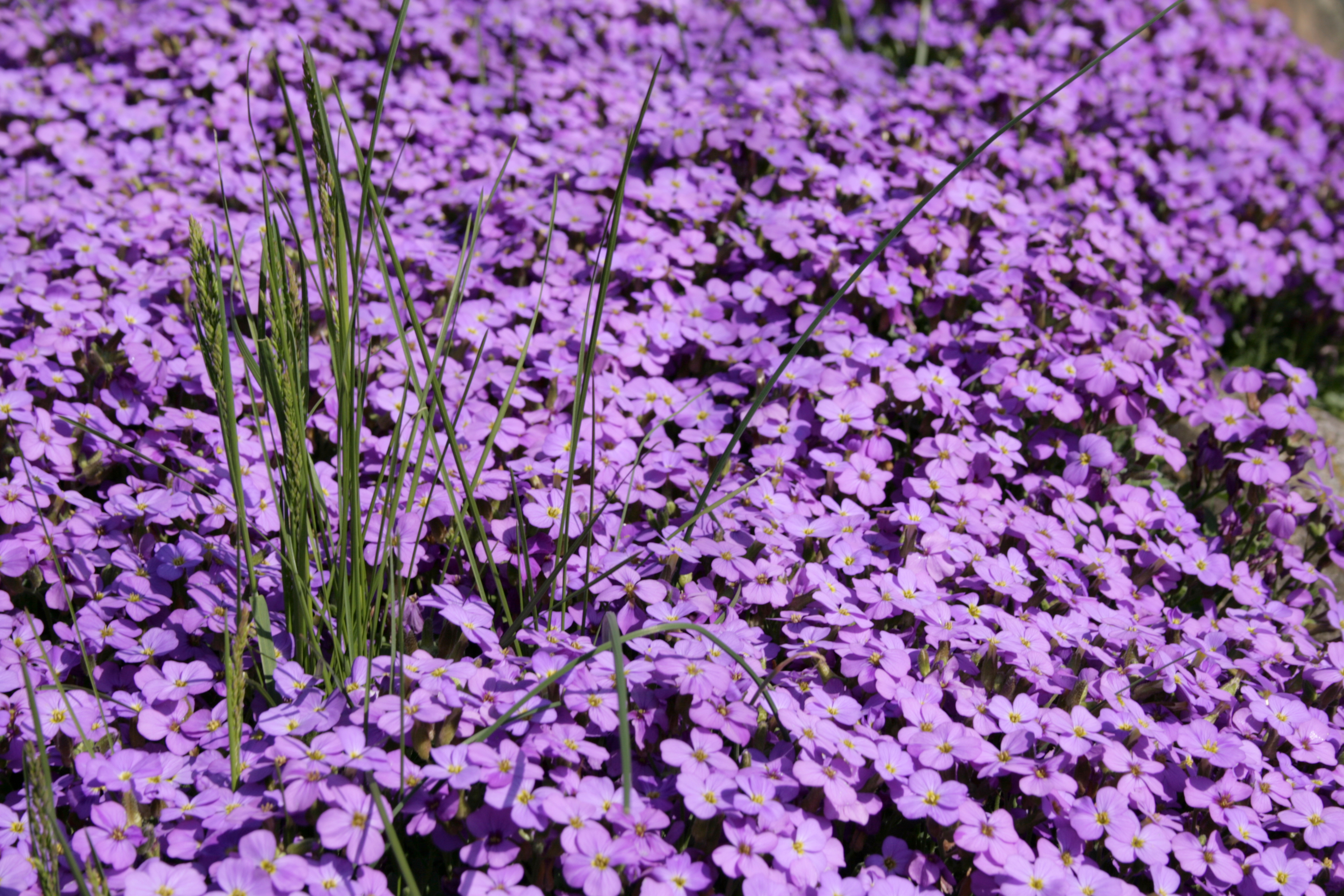 Aubrieta x cultorum from Botaniska trädgården in Lund, Sweden.